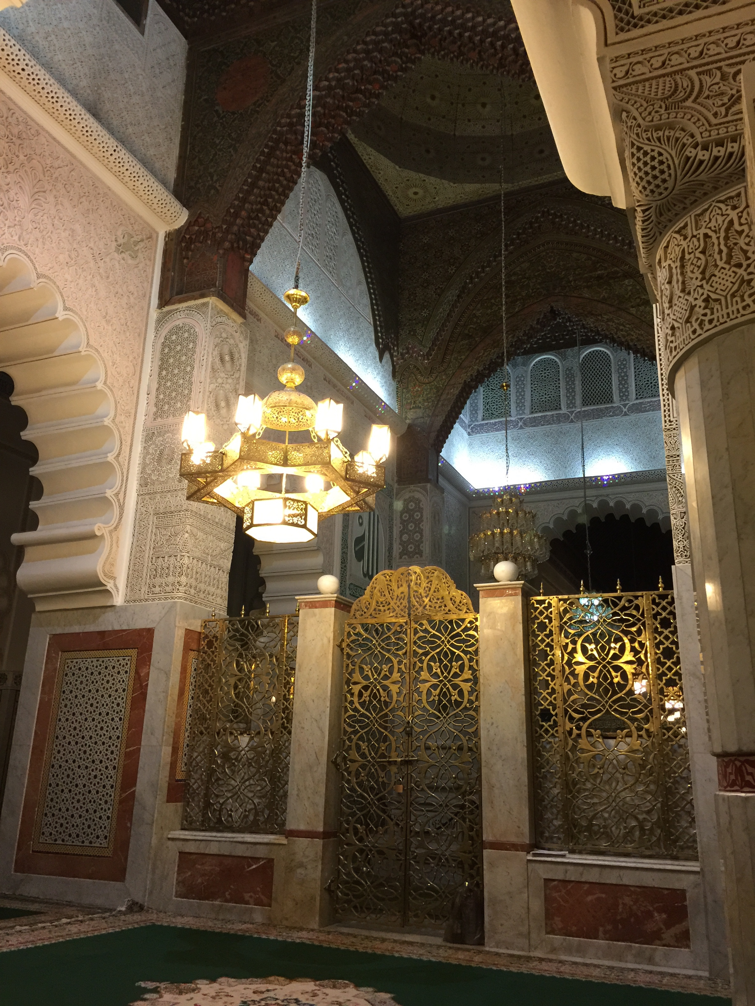 Grille encerclant le tombeau d'Ahmed Tidjani à l'intérieur de la Zaouiya Tidjaniya de Fès